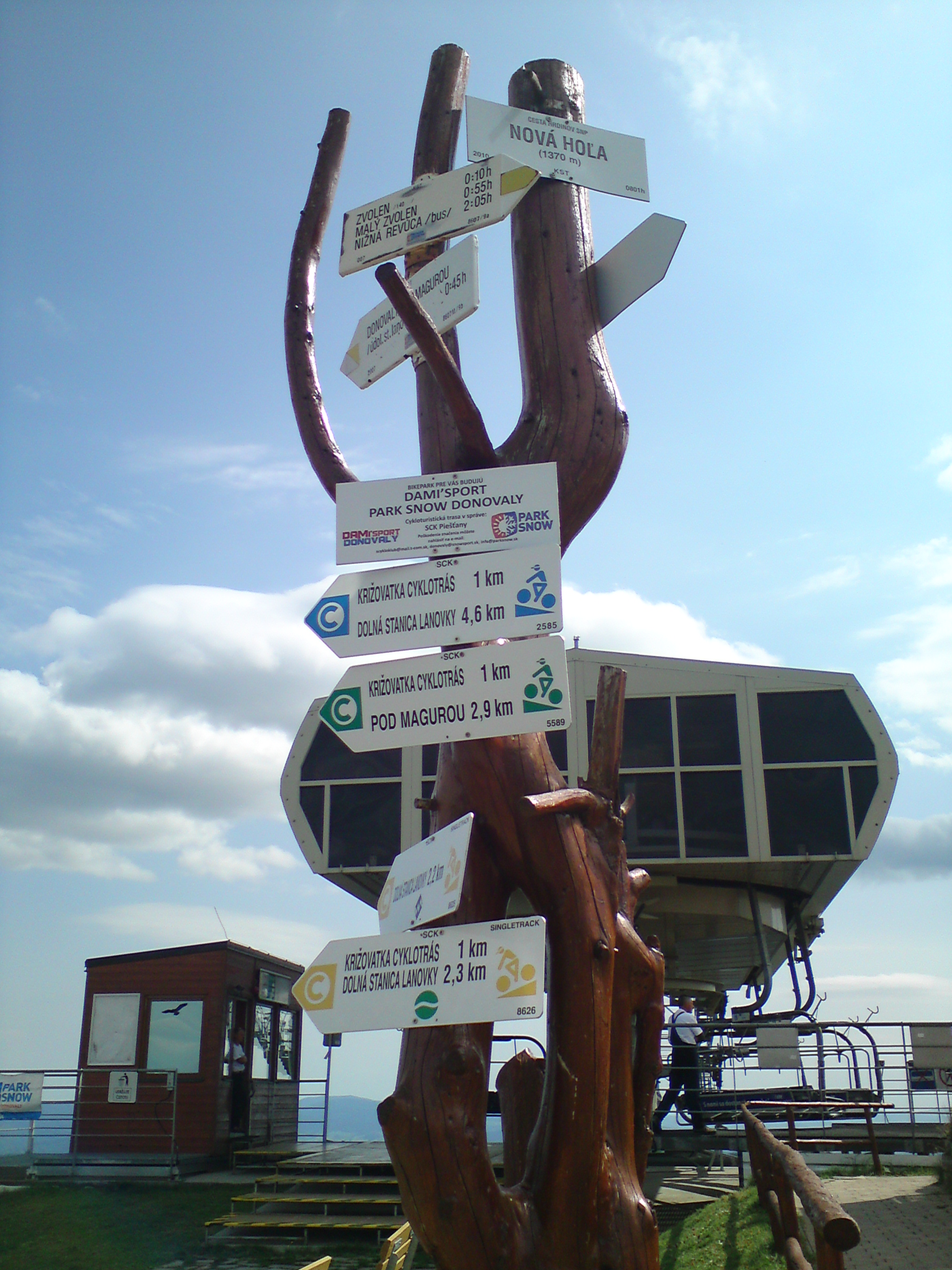 Vrchol Novej Hole